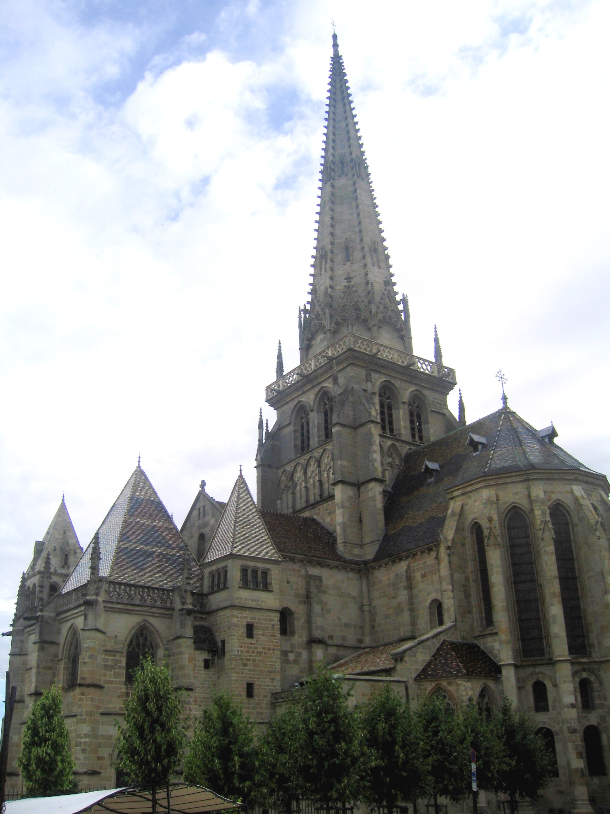 Bourgogne Autun Eglise Saint-Lazare Chevet 17072009